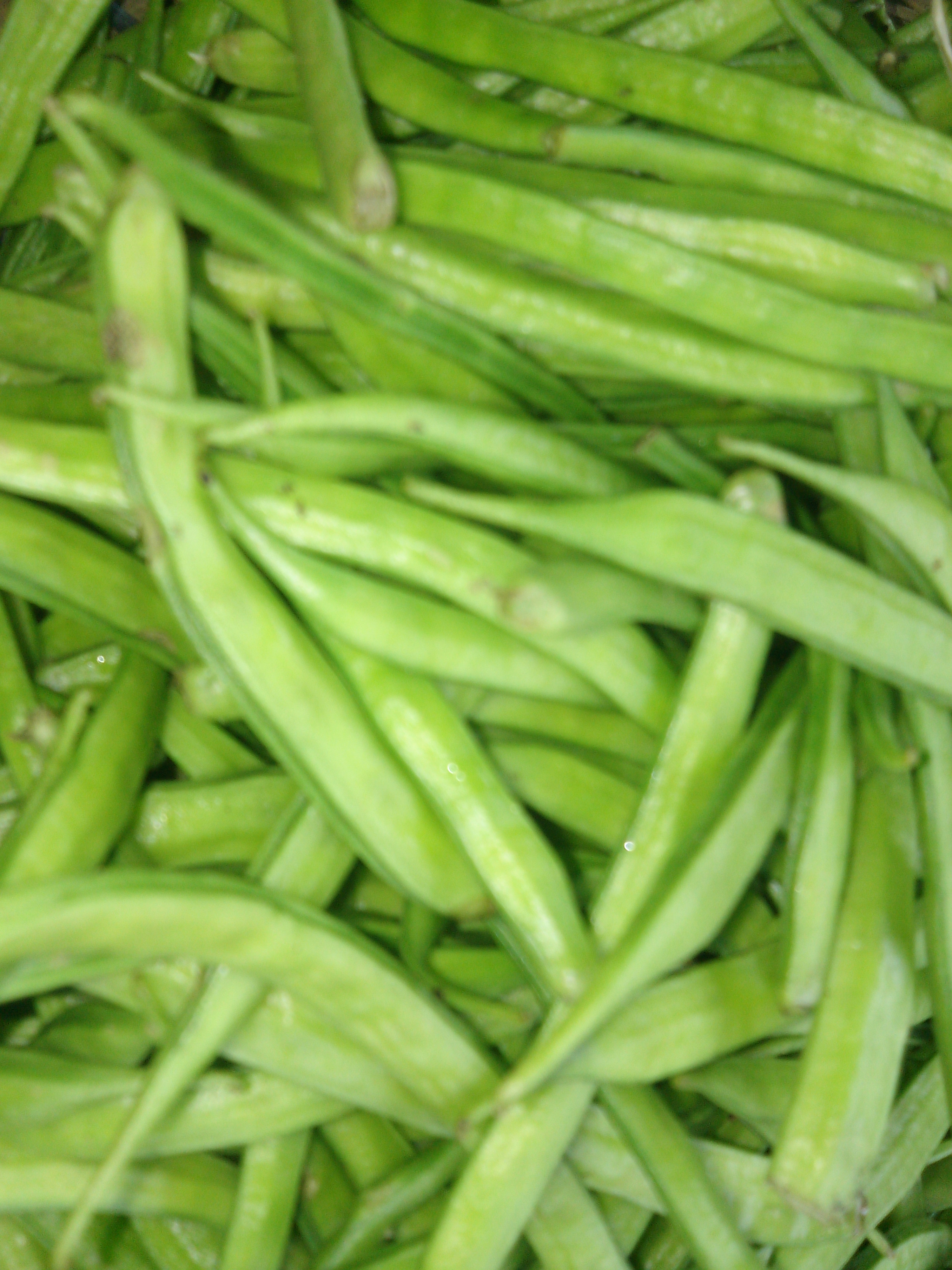 கொத்தவரை.